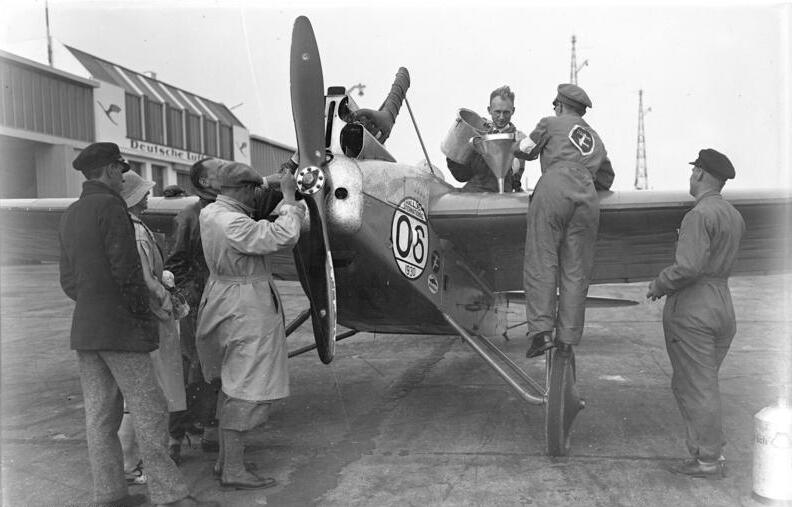 Der grosse internationale Europa-Rundflug 1930 ! Der Start der Maschinen zum internationalen Europa-Rundflug auf dem Centralflughafen in Berlin-Tempelhof. Letztes Füllen der Benzintanks vor dem Start in Tempelhof.